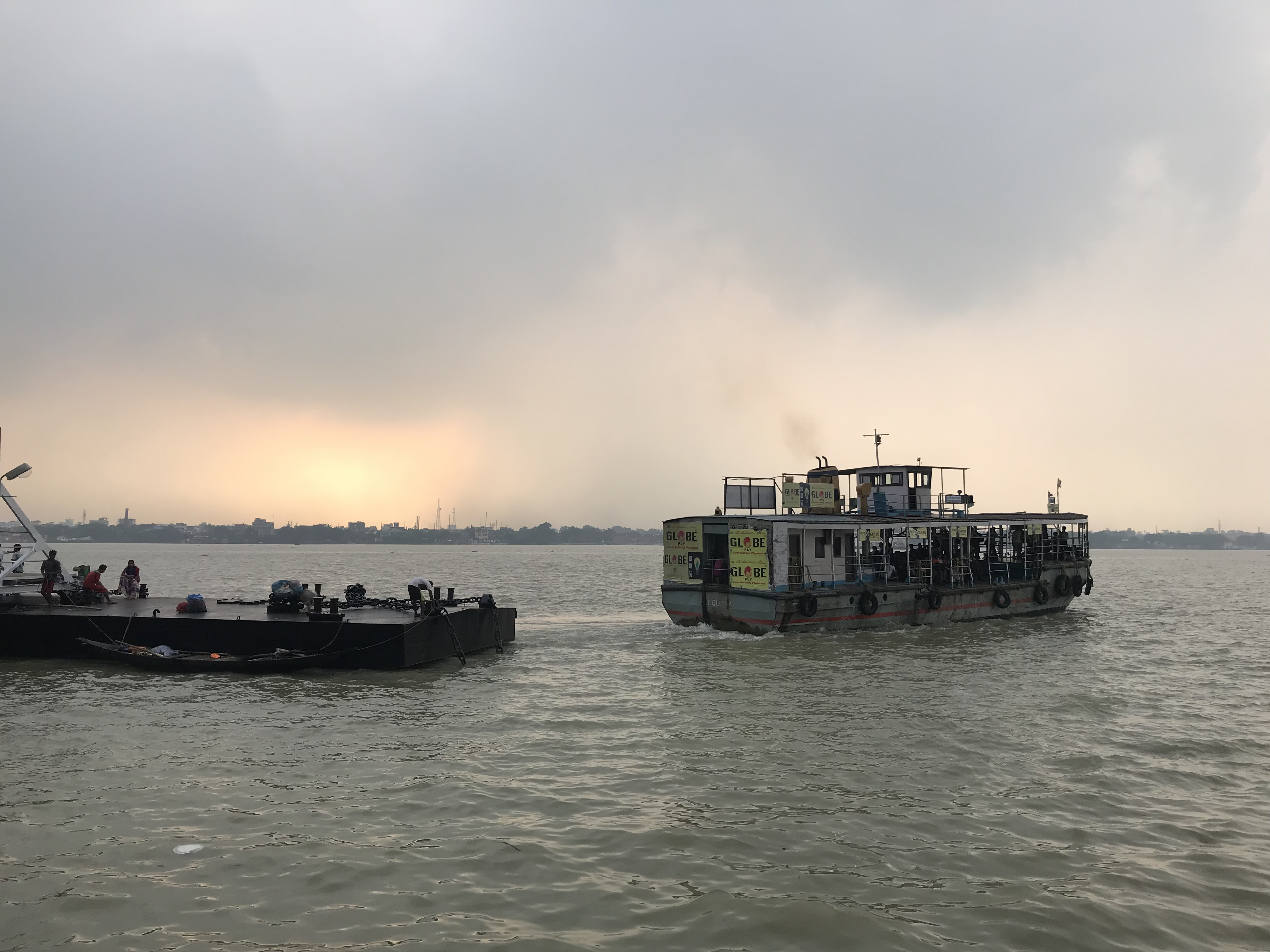 Bagbazar Launch Ghat in Kolkata.